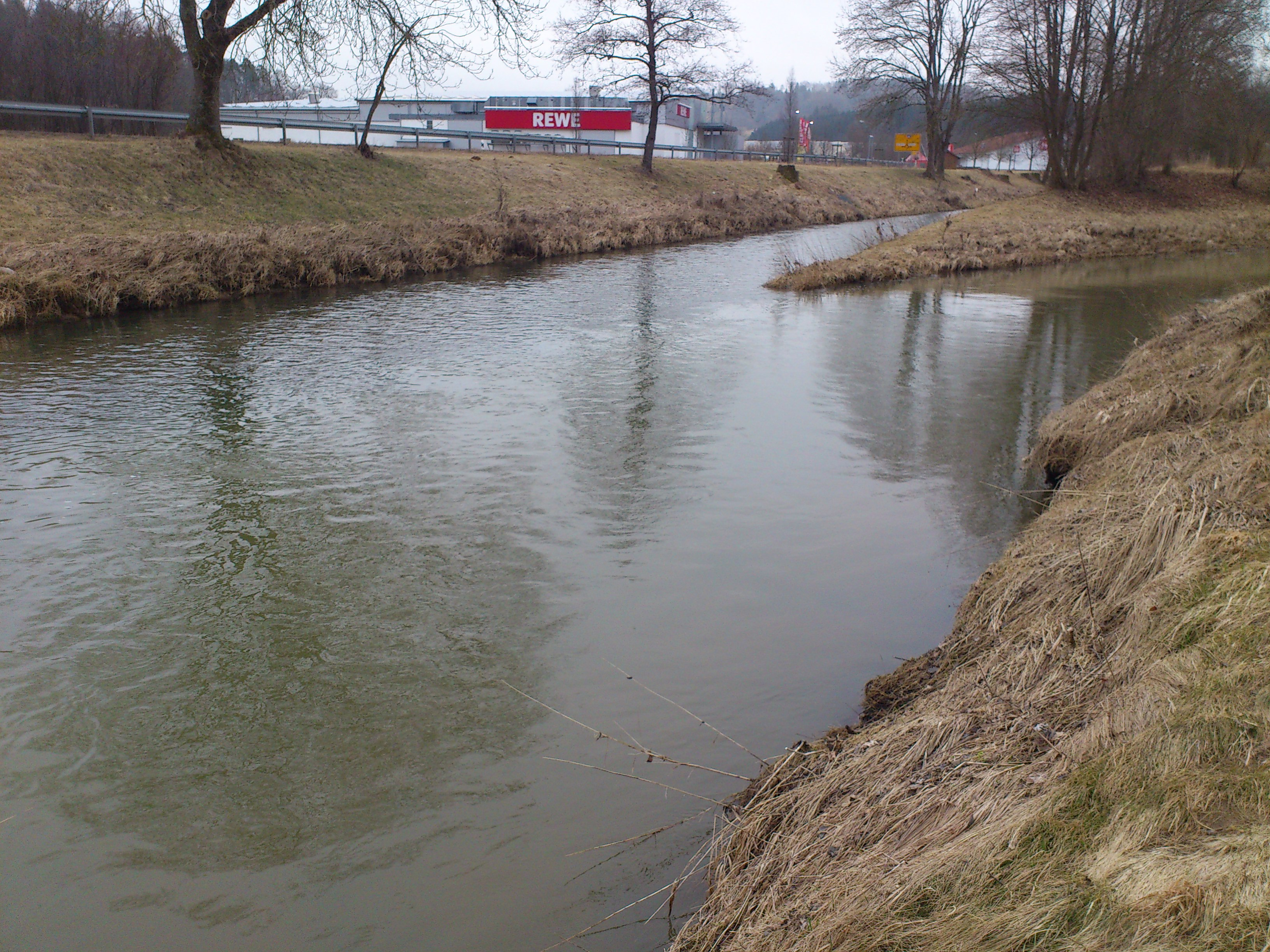 Die Lein (rechts) mündet in den Kocher (v. hintem n. vorne links)